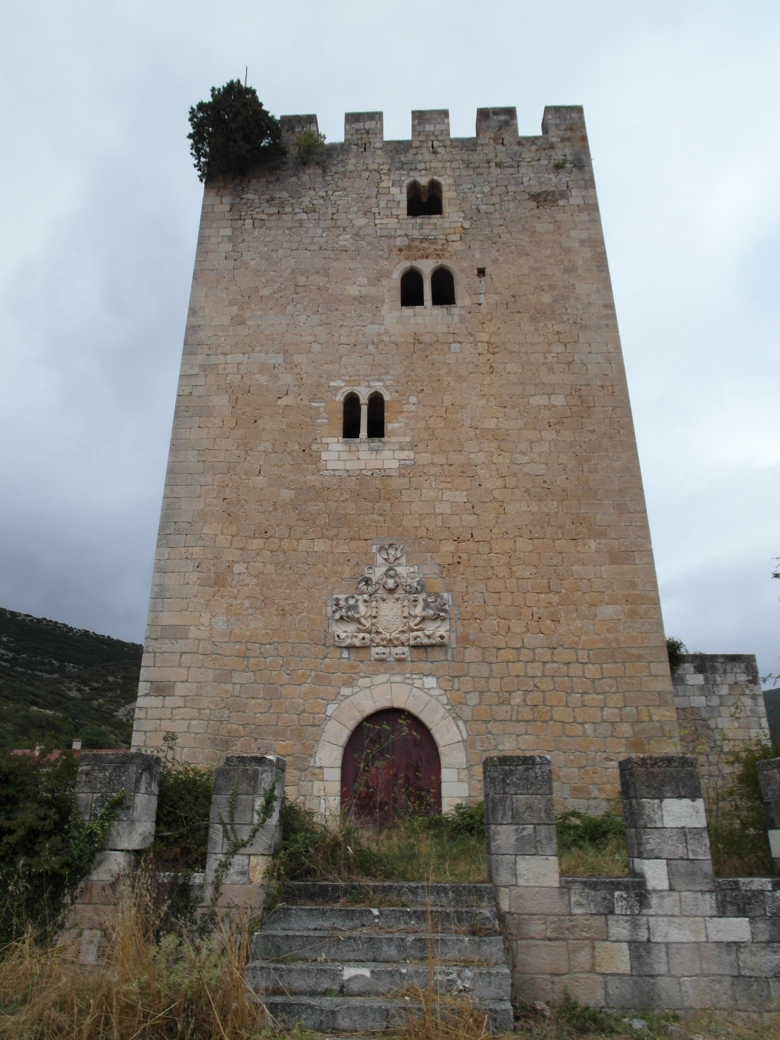 Valdenoceda, Burgos.